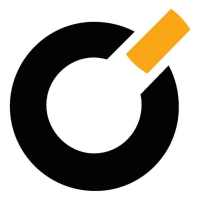 Class Logo Open Bic